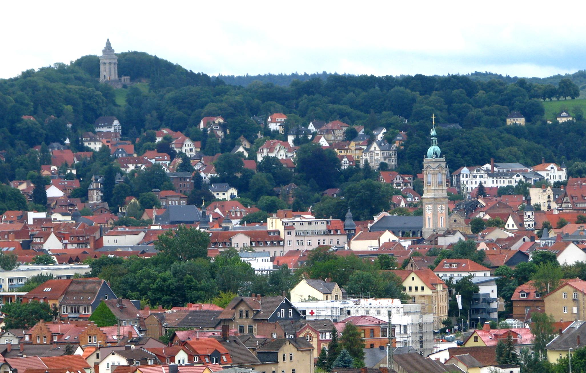 Blick von der Michelskuppe auf die Innenstadt von Eisenach; links oben das Burschenschaftsdenkmal